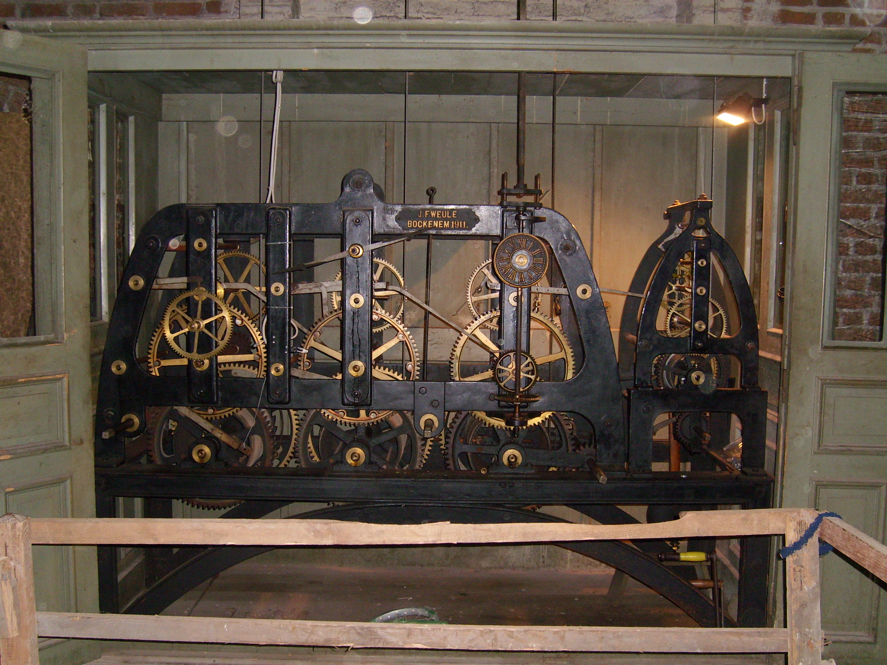 Turmuhr der St.-Marien-Kirche Greifswald